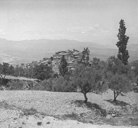 Vista general de Montesquiu amb oliveres en primer terme. Frederic Bordas i Altarriba (ca. 1890)